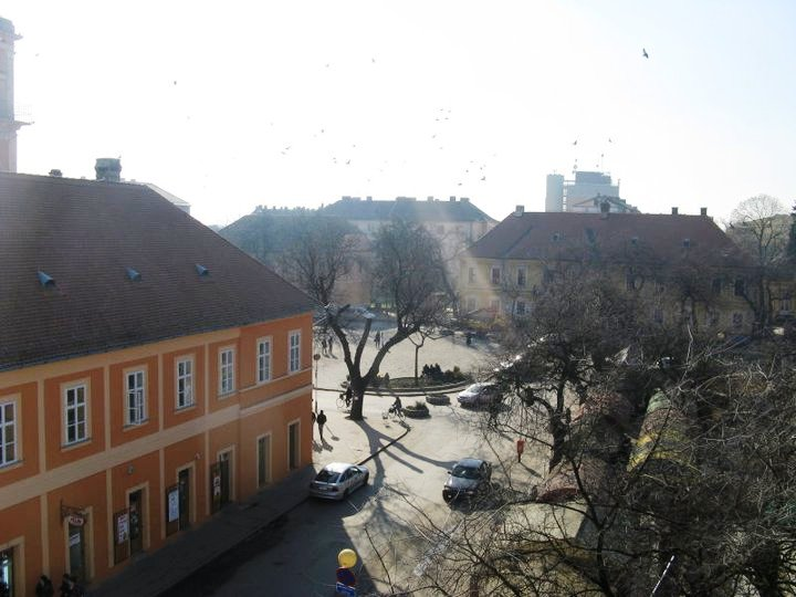 Трг св. тројства у Сомбору.